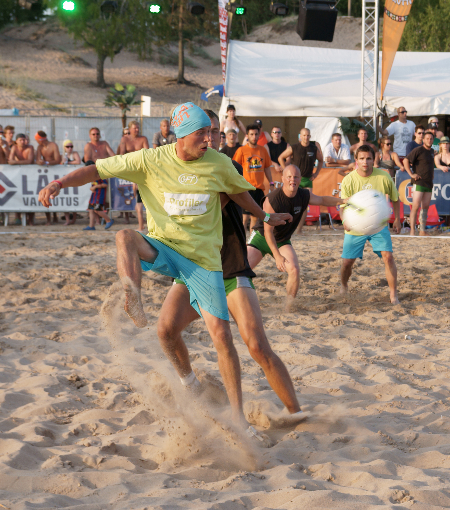 BF Mesikämmenen puolustaja yrittää pitää kiinni GFT Team Beachin Henrik Henrikssonista.